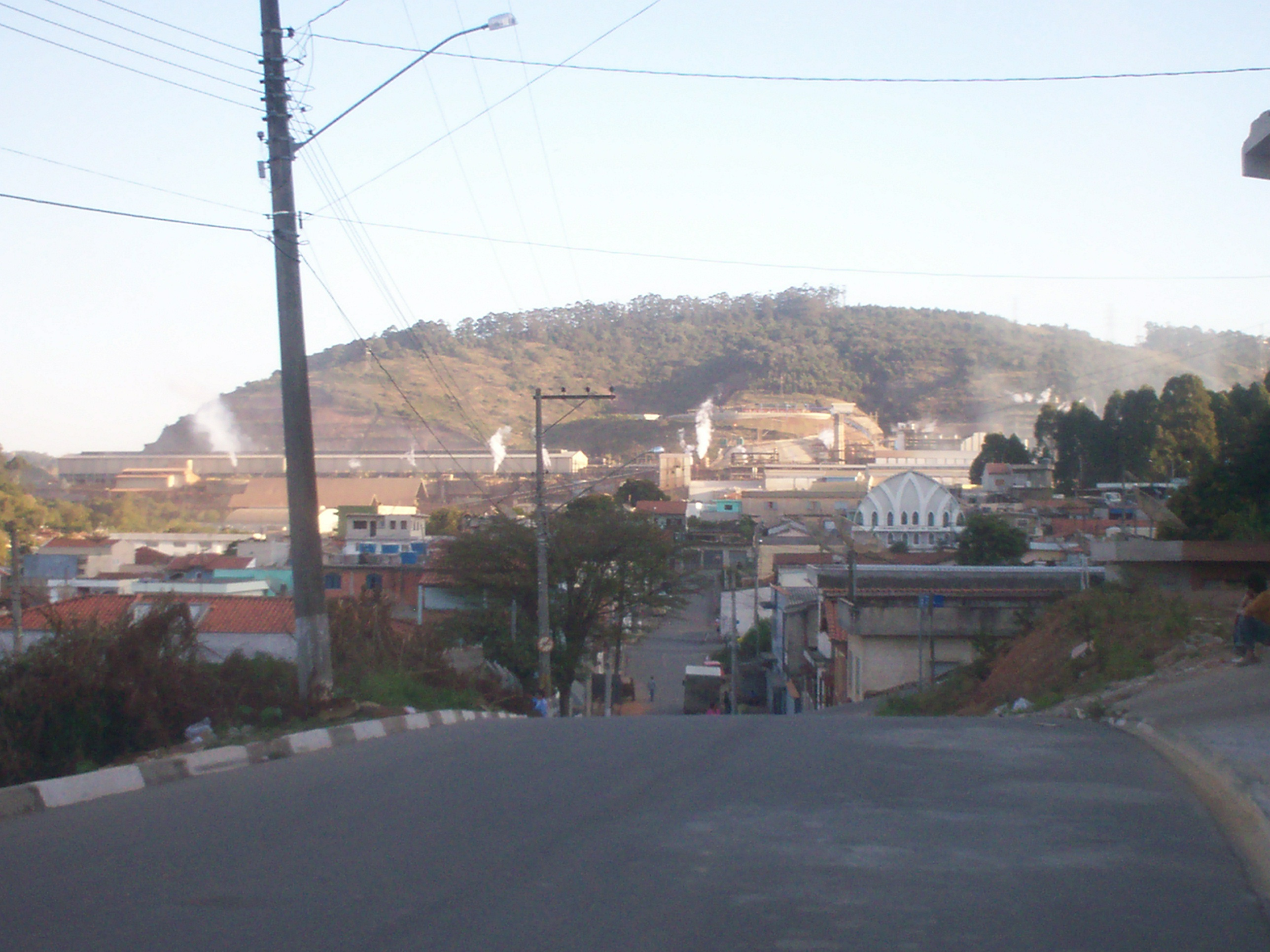 Cidade de Alumínio (SP)